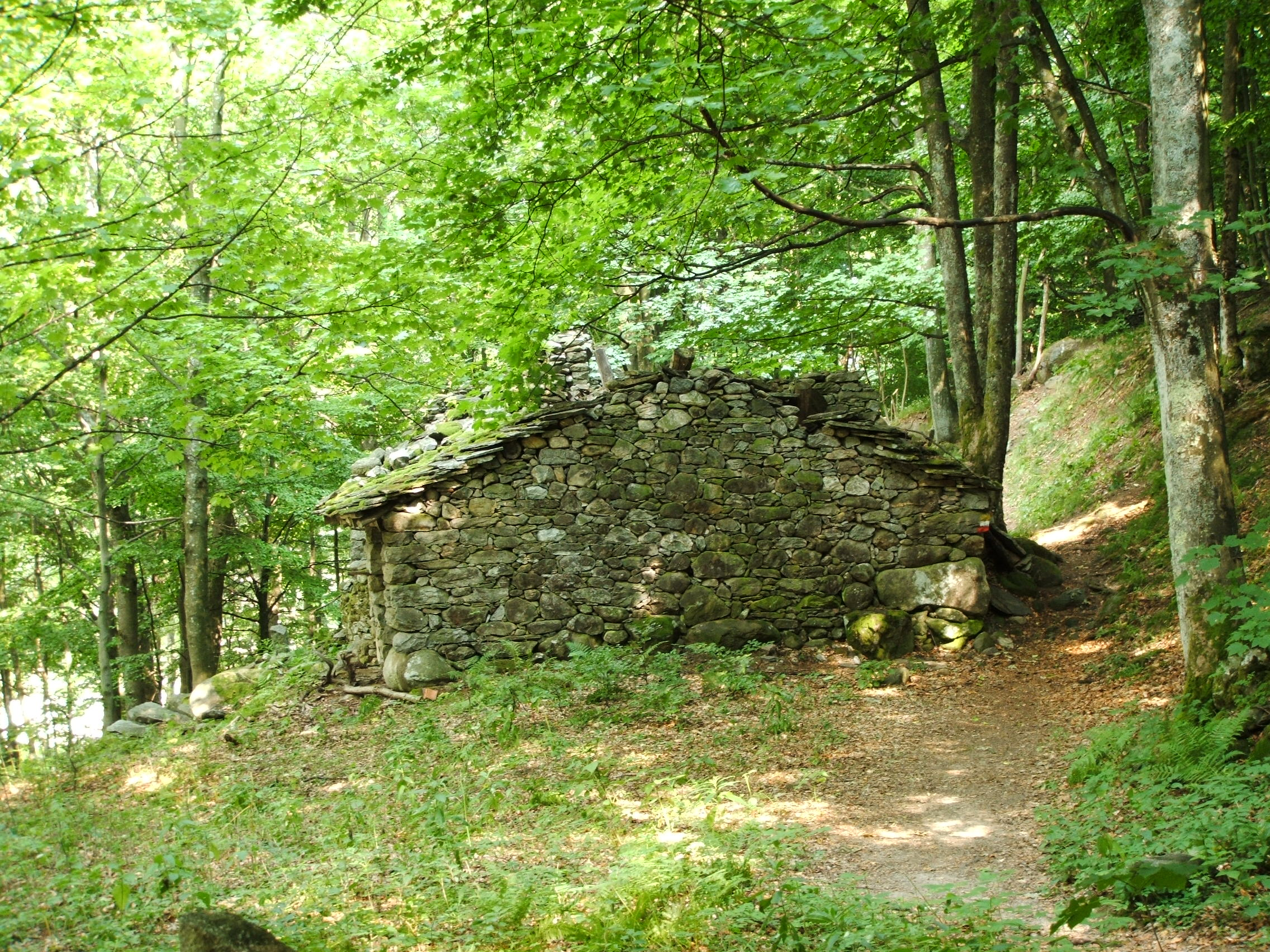 Piedicavallo, comune della Valle Cervo, provincia di Biella (Piemonte, Italia)